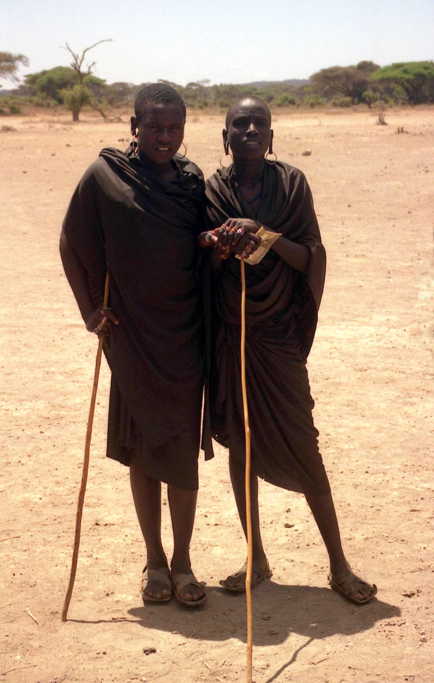 beschnittene Masai-Jungen mit schwarzer Kleidung